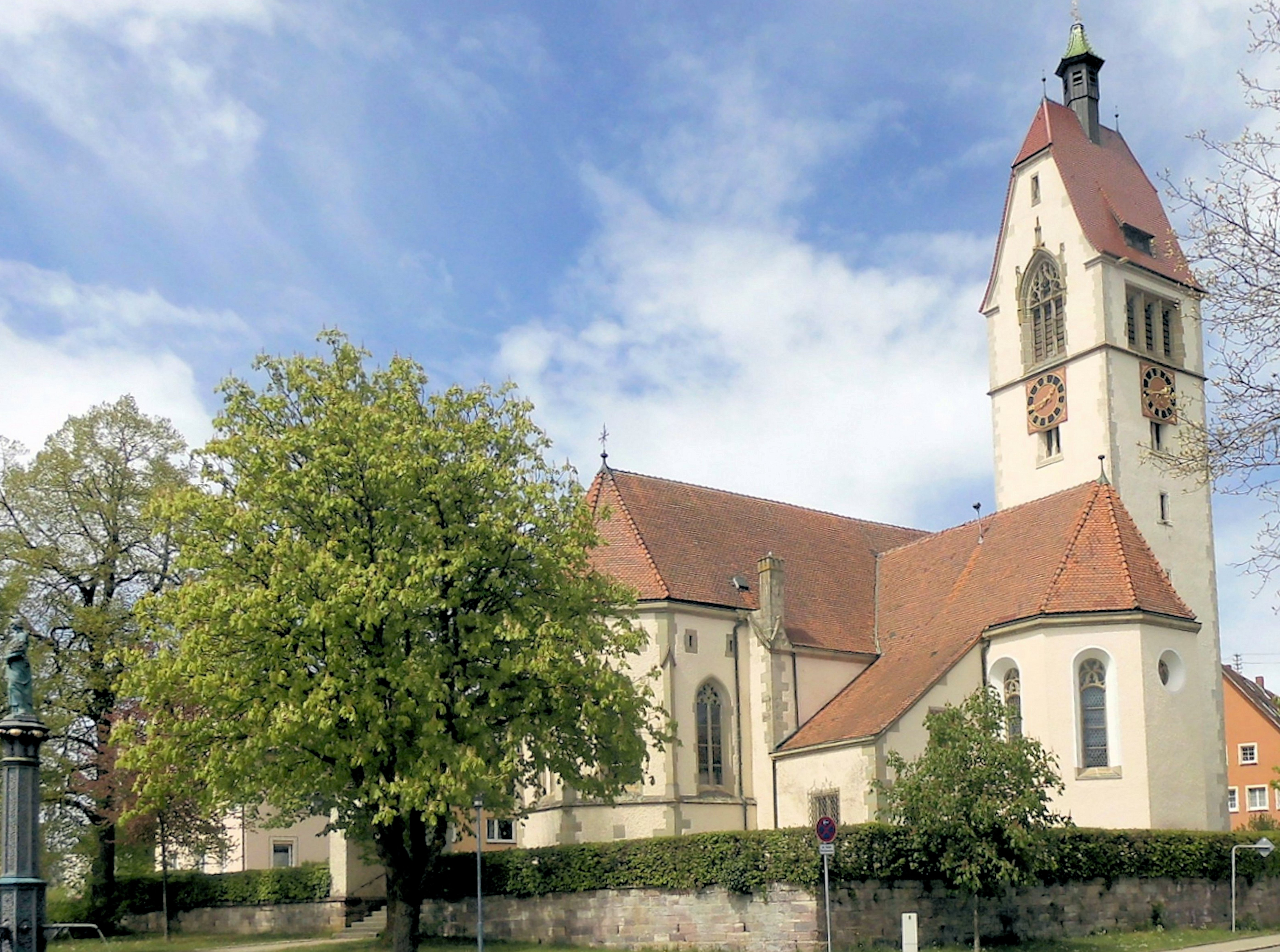 Kirche St. Mauritius in Sunthausen, Stadt Bad Dürrheim, Deutschland